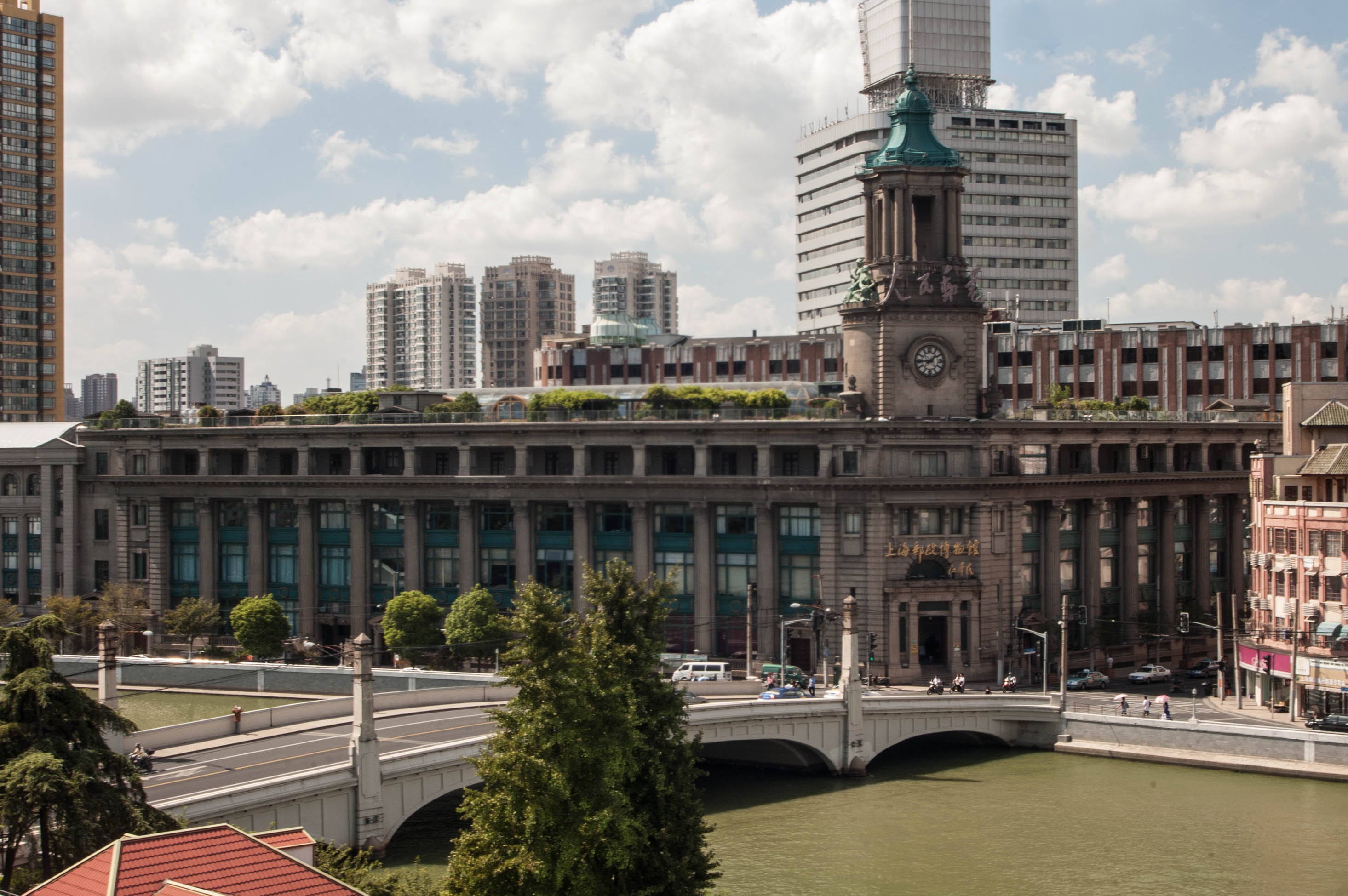 中文（中国大陆）: 上海邮政总局